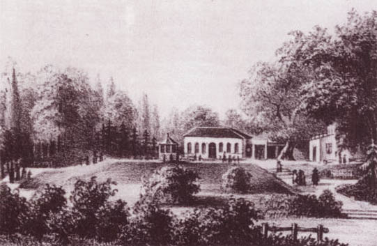 Berghölzchen um 1860 (Lithographie)